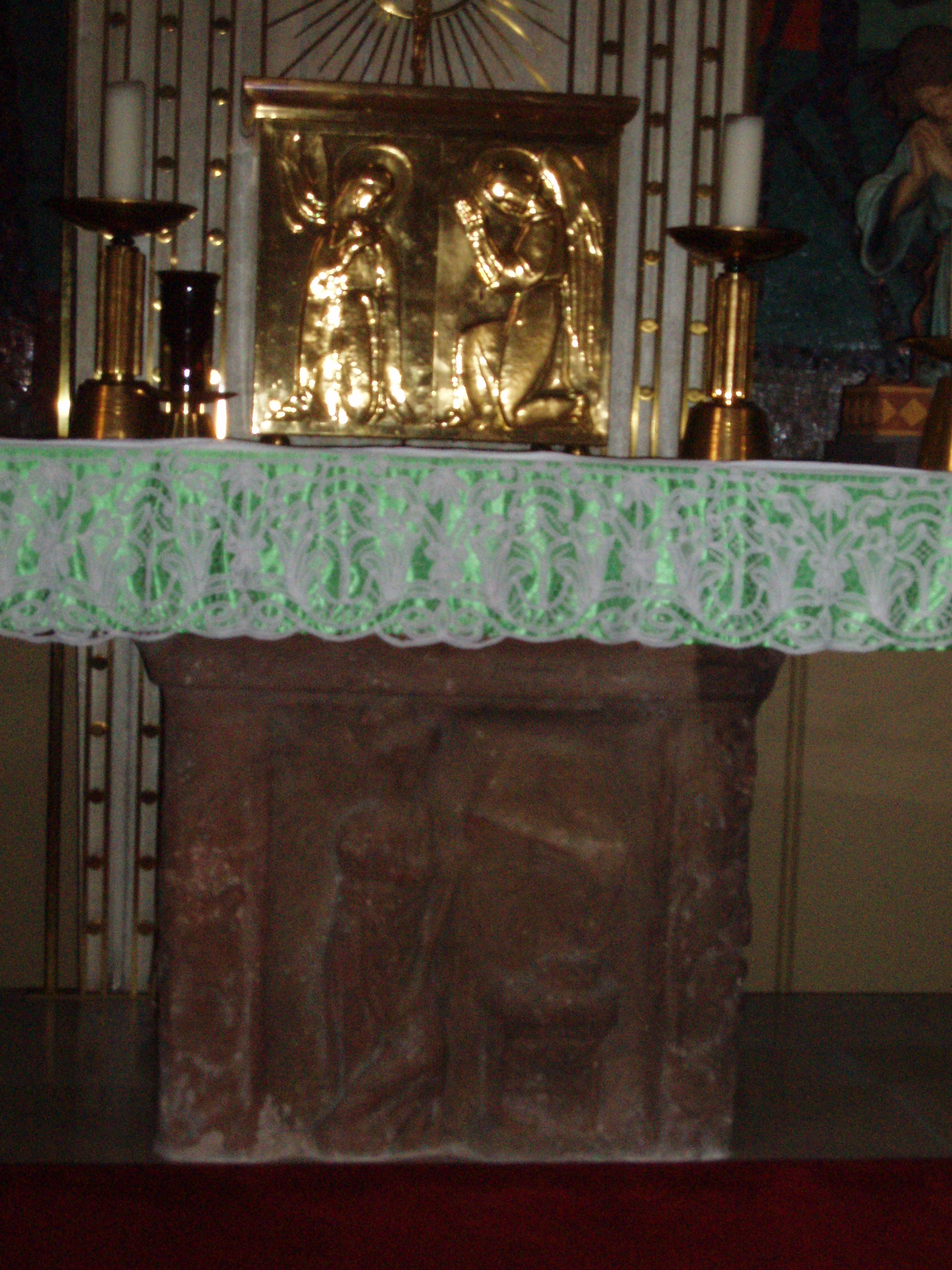 Berdorf Romeinse viergodensteen - Minerva en kerkaltaar